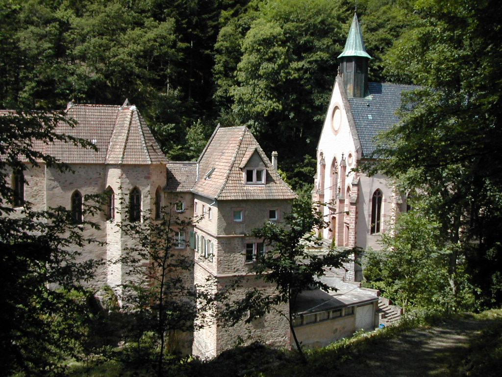 Photo : Philippe Dollé - 18/06/2006 - Notre-Dame de Dusenbach à Ribeauvillé (Alsace/France)